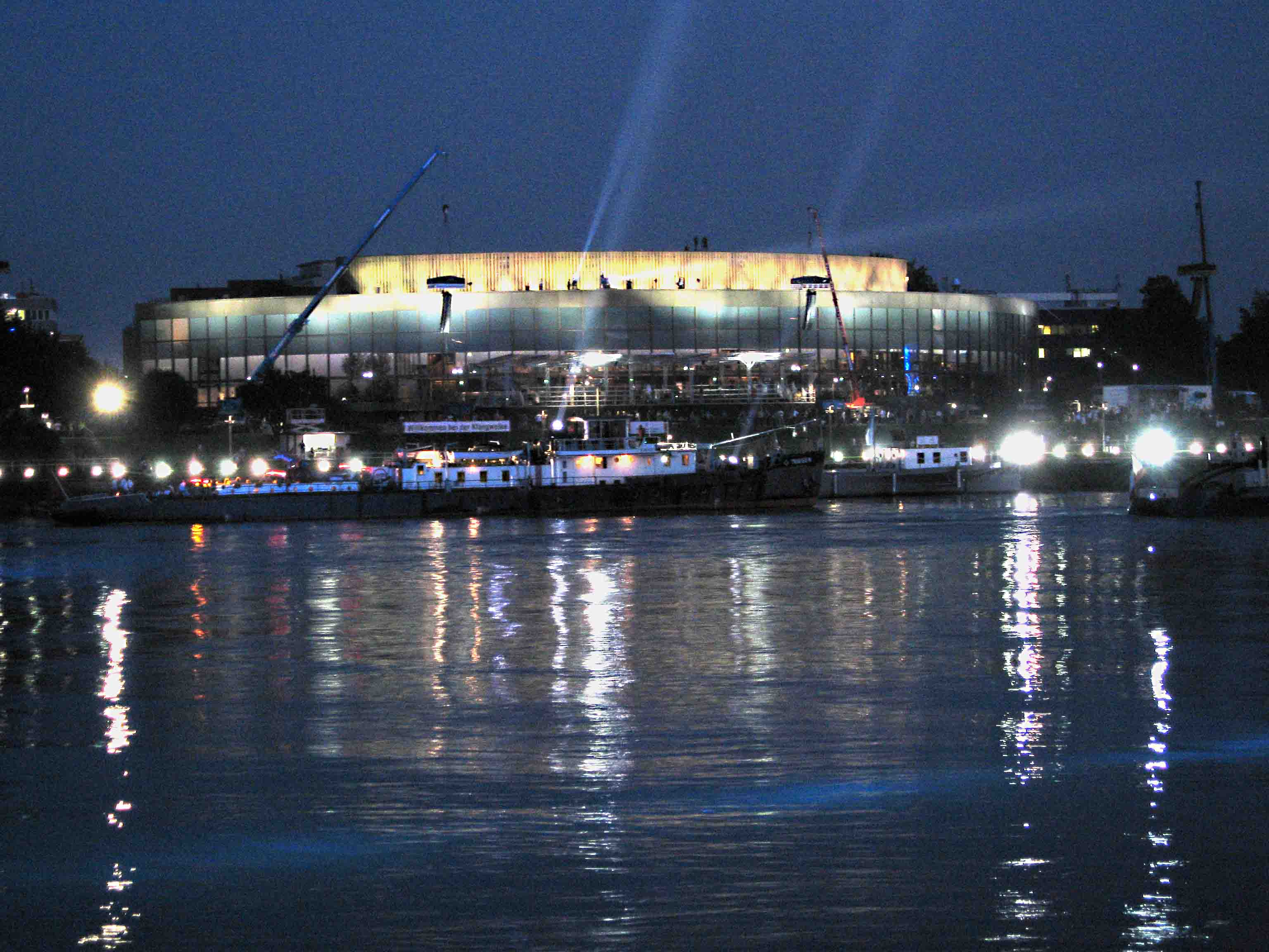 Brucknerhaus, Linzer Klangwolke 2005, Linz, Austria